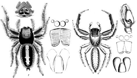 Sandalodes superbus female and male